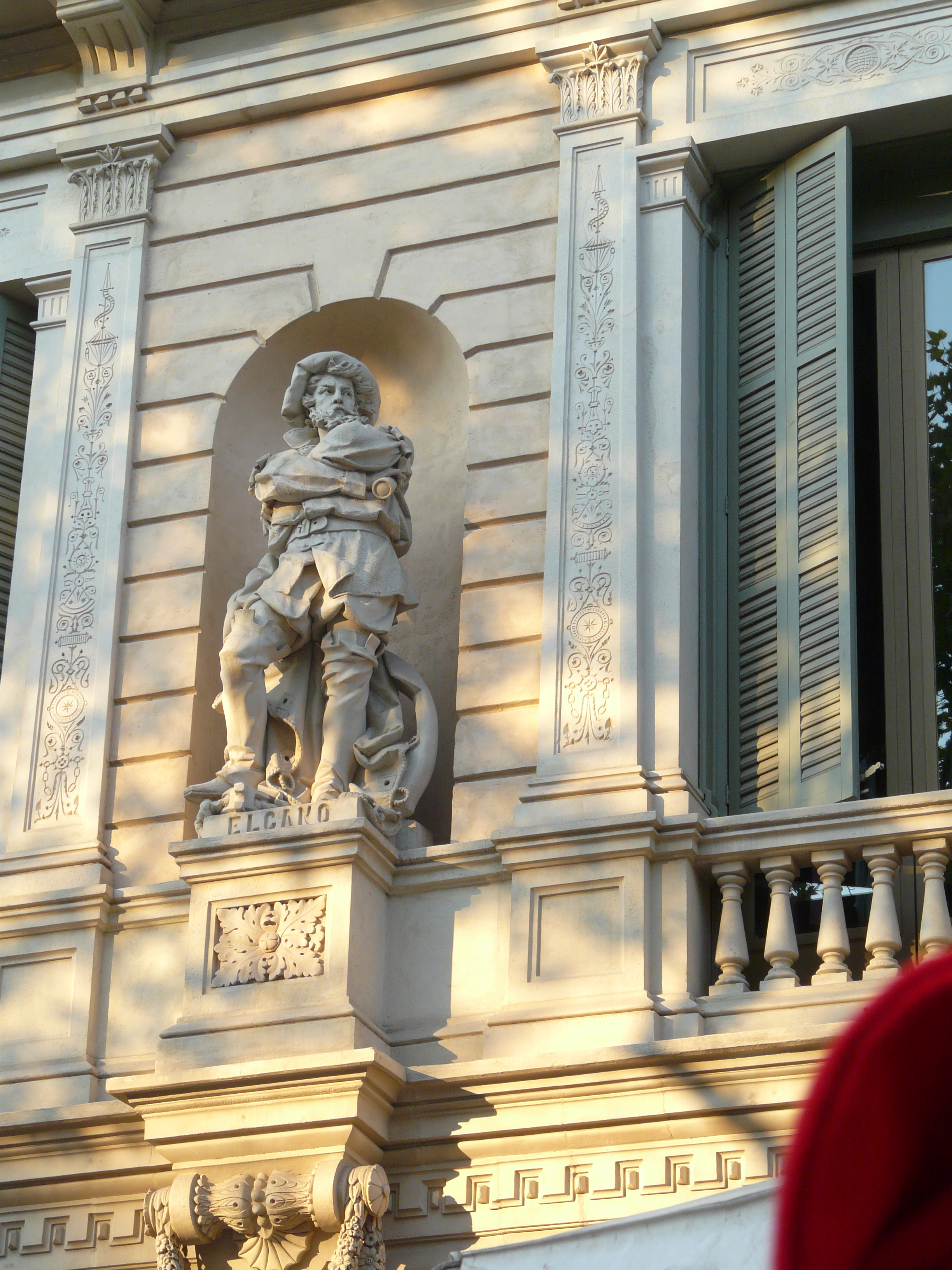 Casa Olano (Barcelona) Object location41° 23′ 34.22″ N, 2° 09′ 52.86″ E